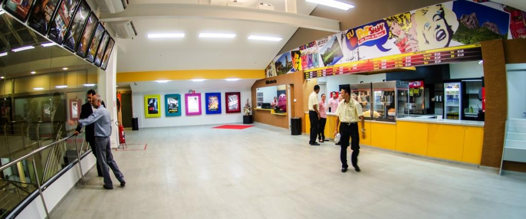 Foto do complexo Rede Cine Show Shopping Cadima da cidade de Nova Friburgo, Rio de Janeiro